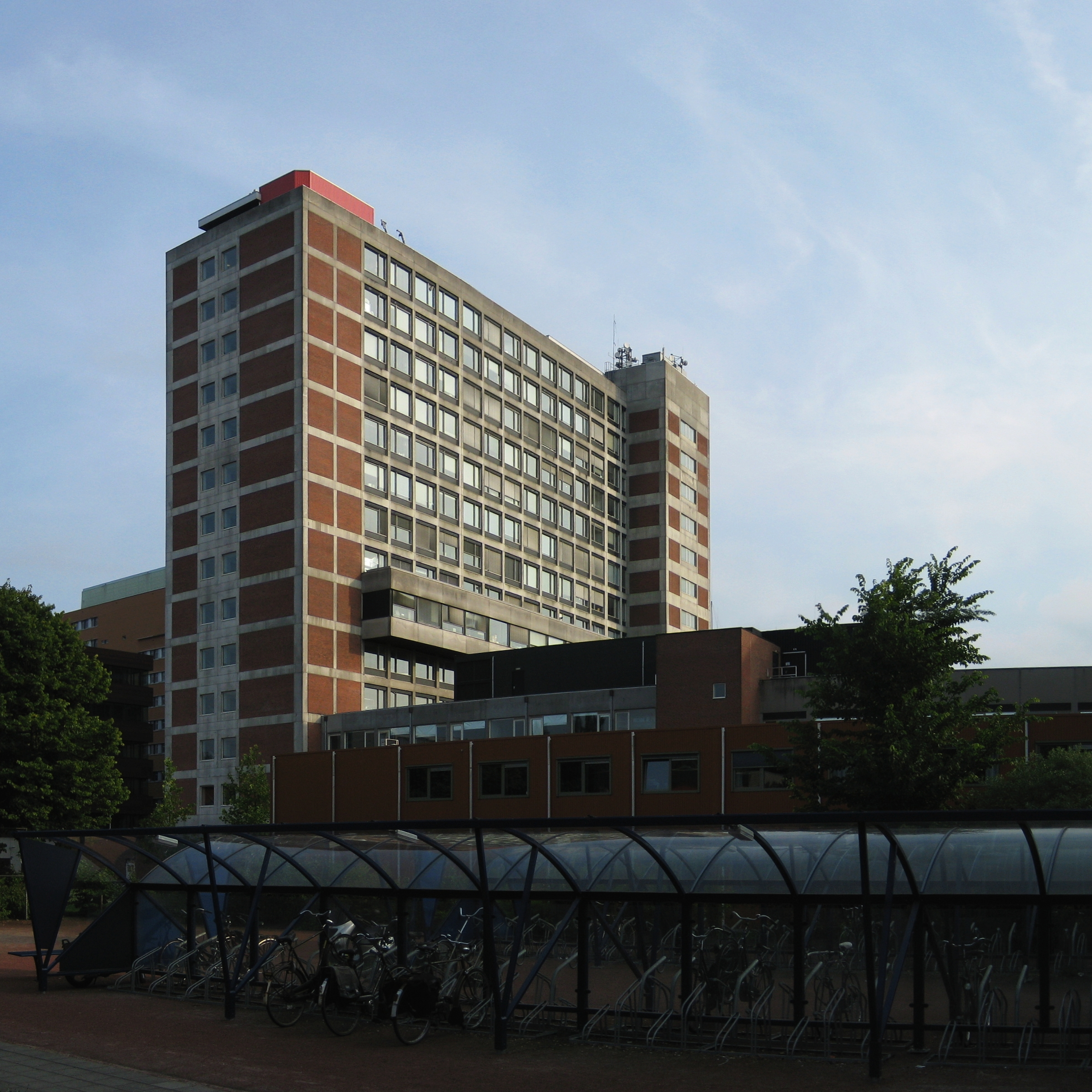 Het Faculteitsgebouw Medische Wetenschappen van de Rijksuniversiteit Groningen. Het pand dateert uit 1972.